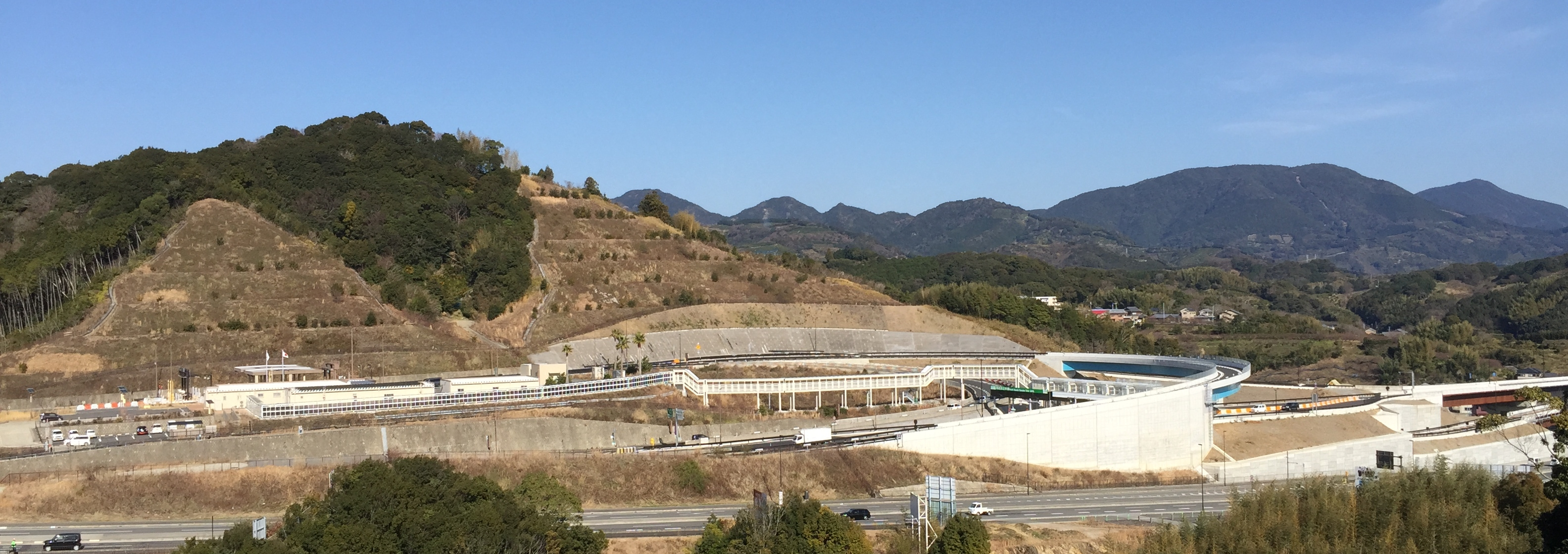 紀伊田辺インターチェンジ全景